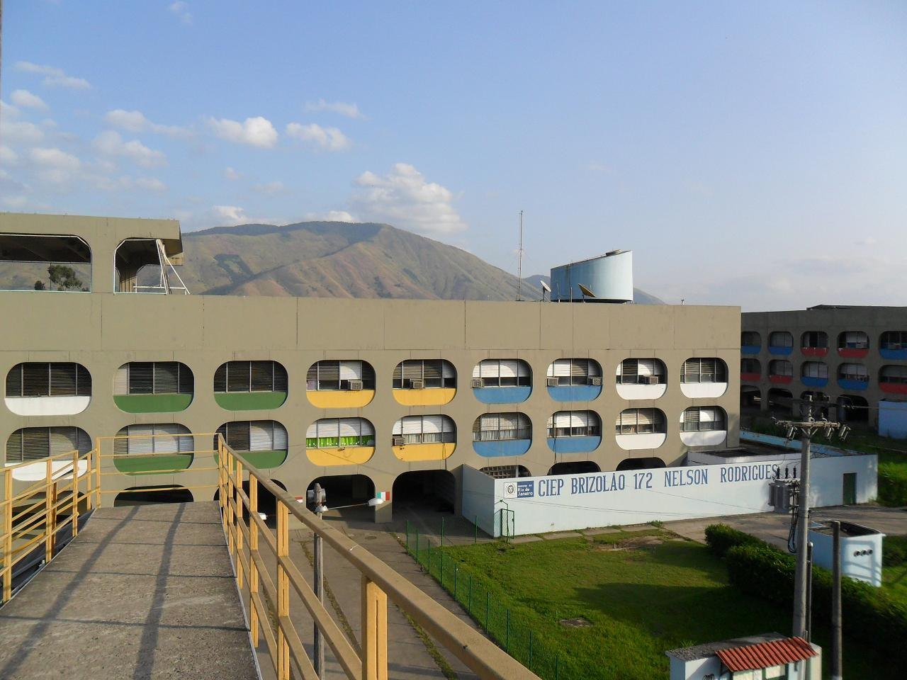 CIEP 172